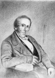 Bildbeschreibung: Carl Friedrich von Ledebour, Botaniker Fotograf/Zeichner: unbekannt Datum: 19. Jh. Sonstiges: ...